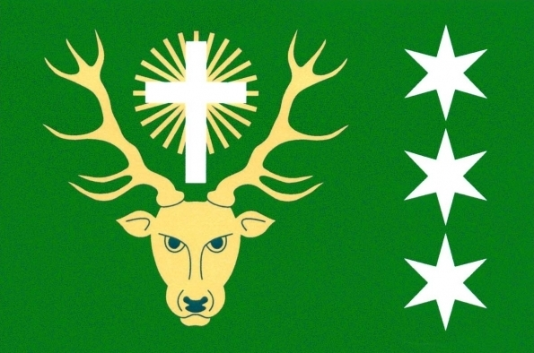 vlajka, Drahouš, okres Rakovník